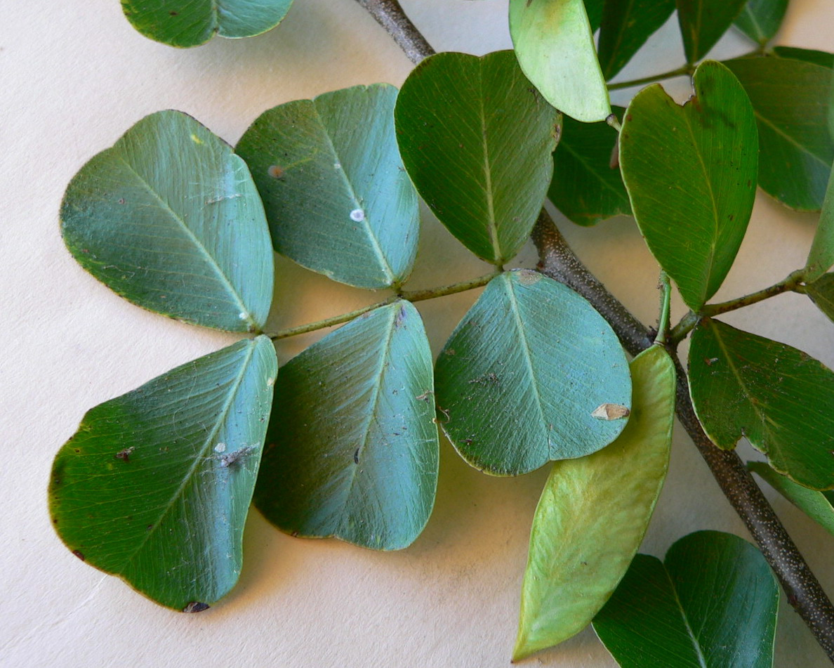 Haematoxylum campechianum, feuille, Guadeloupe